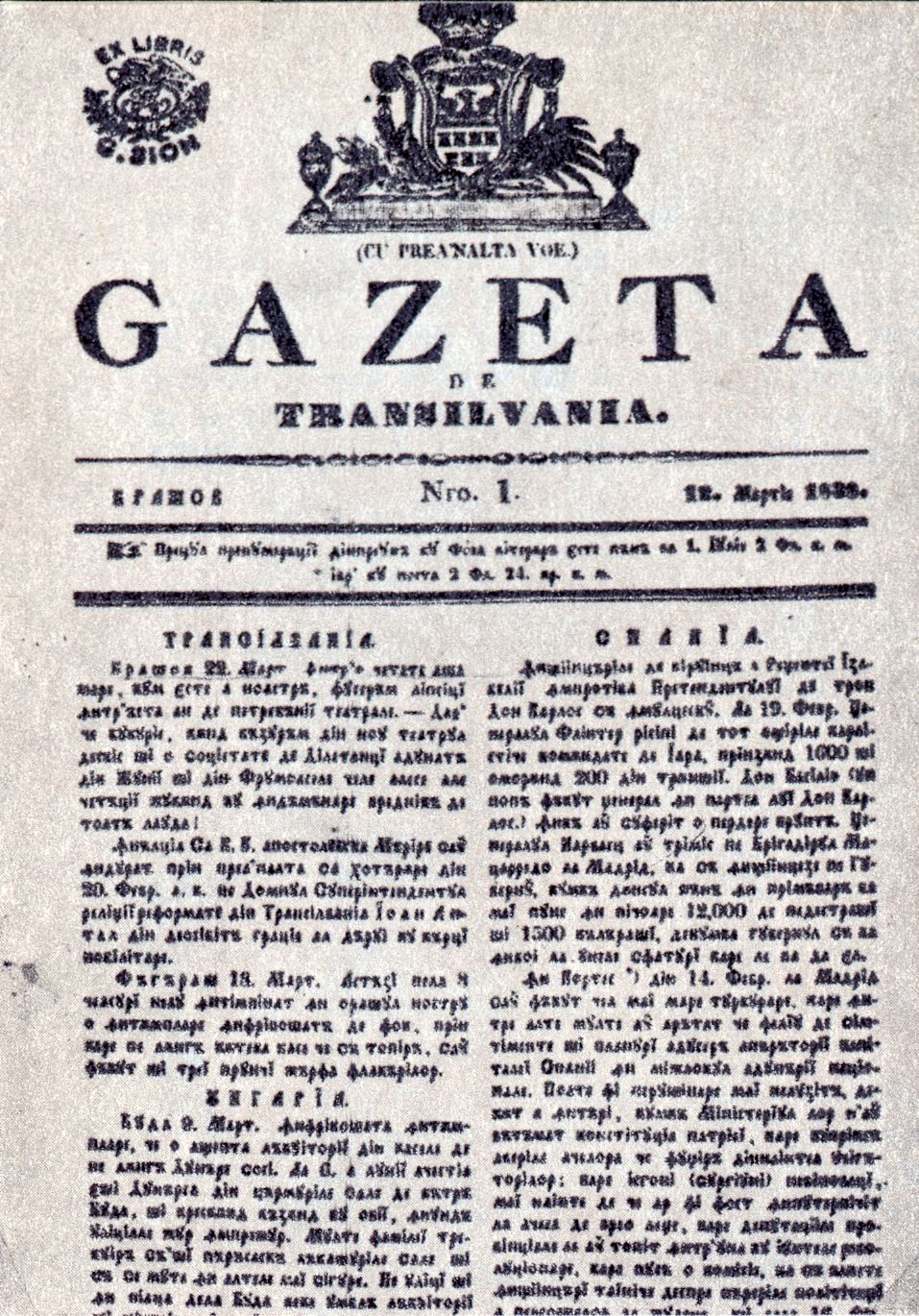 Gazeta de Transilvania, first issue